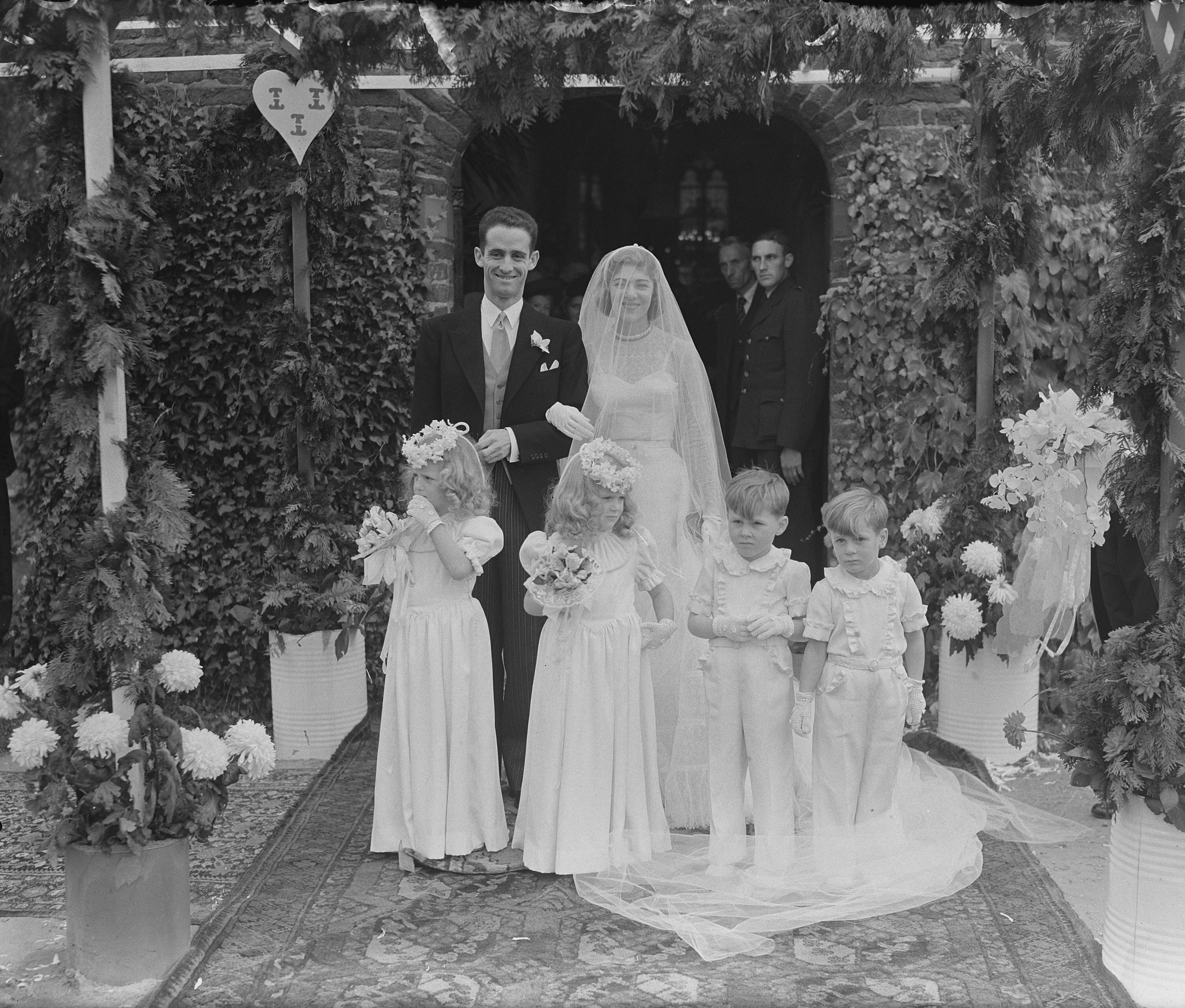 Collectie / Archief : Fotocollectie Anefo Reportage / Serie : [ onbekend ] Beschrijving : Huwelijk te Haarzuilen Graaf Van Nicolay Barones van Zuilen van Nijevelt van der Haan Datum : 11 oktober 1950 Locatie : Haarzuilens Trefwoorden : huwelijken Persoonsnaam : Barones van Zuilen van Nijevelt van der Haan Fotograaf : Noske, J.D. / Anefo Auteursrechthebbende : Nationaal Archief Materiaalsoort : Glasnegatief Nummer archiefinventaris : bekijk toegang 2.24.01.09 Bestanddeelnummer : 904-2401 Reacties Geplaatst door Maaike op 01 oktober 2013 - 16:35. Huwelijk te Haarzuilen. Graaf François de Nicolay en barones Marie-Hélène Naila Stéphanie Josina barones van Zuylen van Nyevelt van de Haar Persoonsnamen: barones M.H.N.S.J. van Zuylen van Nyevelt van de Haar, graaf François de Nicolay